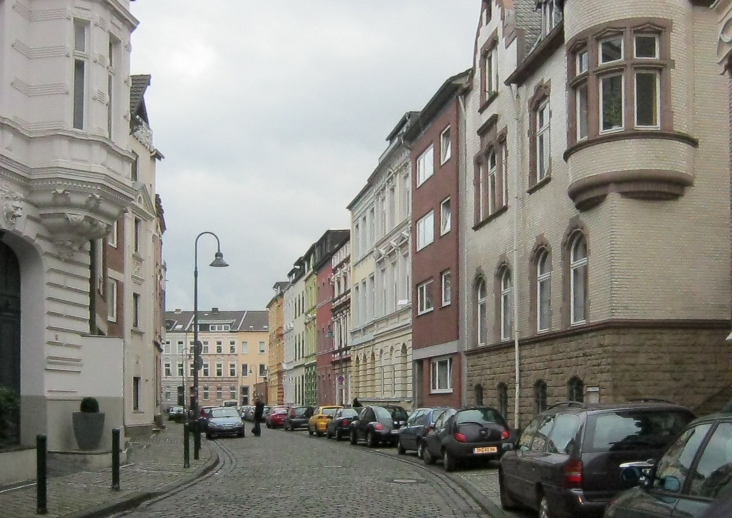 Holzstraße in the city of dueren